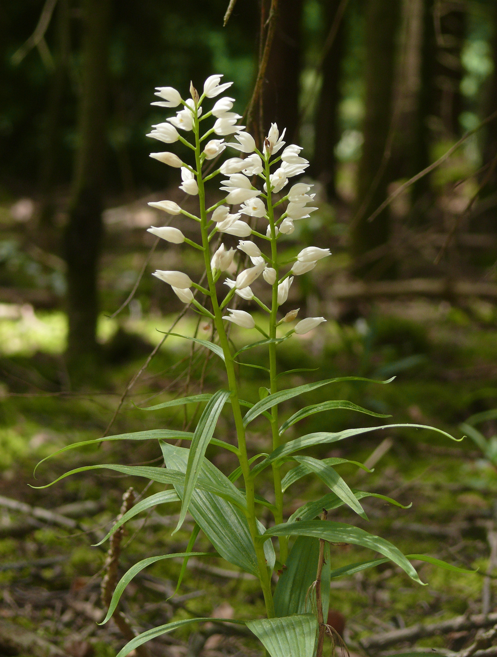 Cephalanthera longifolia, Alb-Wutach, Deutschland